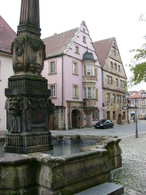 Bayreuth, Kanzleistrasse, Obelisk, Seckendorffer Burggut und Nanckenreuther Burggut im Hintergrund